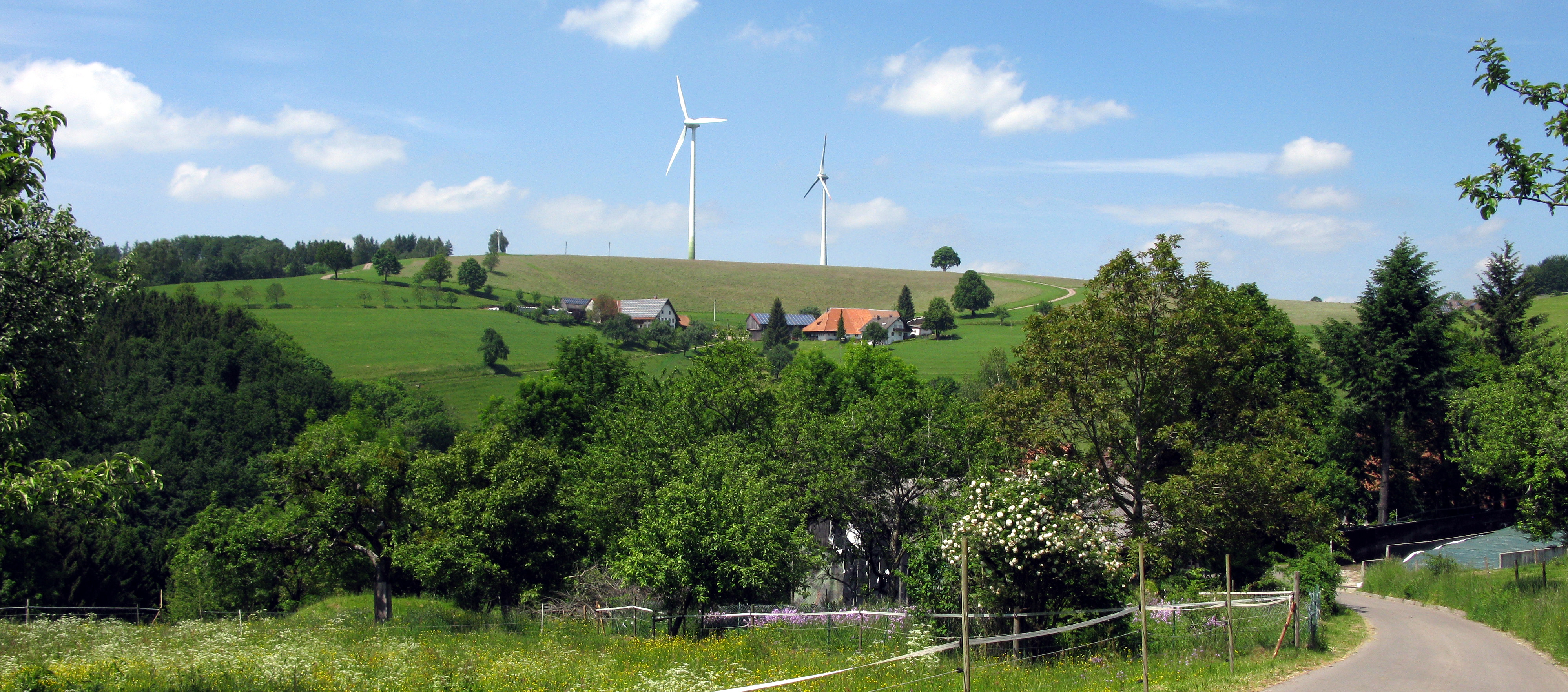 Freiamt, Blick zum Schillinger Berg mit Windrädern